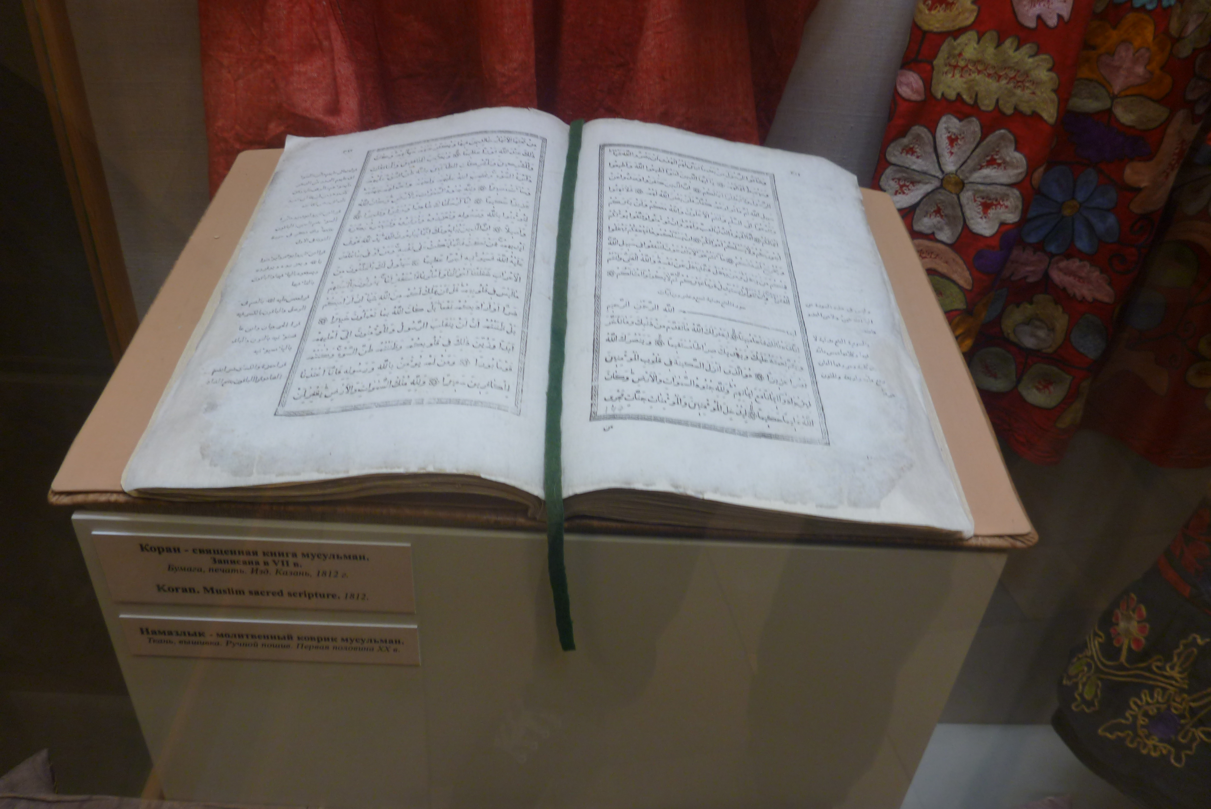 Коран, изданный в Казани в 1812 году, в витрине Музея истории и археологии Урала. Фото 2019 года